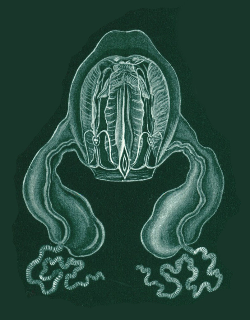 Procharybdis tetraptera (Haeckel) = Alatina tetraptera (Haeckel, 1880)